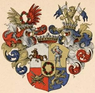 Wrede suguvõsa vabahärravapp